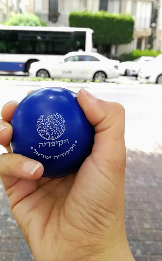 כדור לחץ